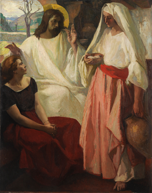 René-Marie Castaing, Jésus chez Marthe et Marie, 1924, Paris, ENSBA